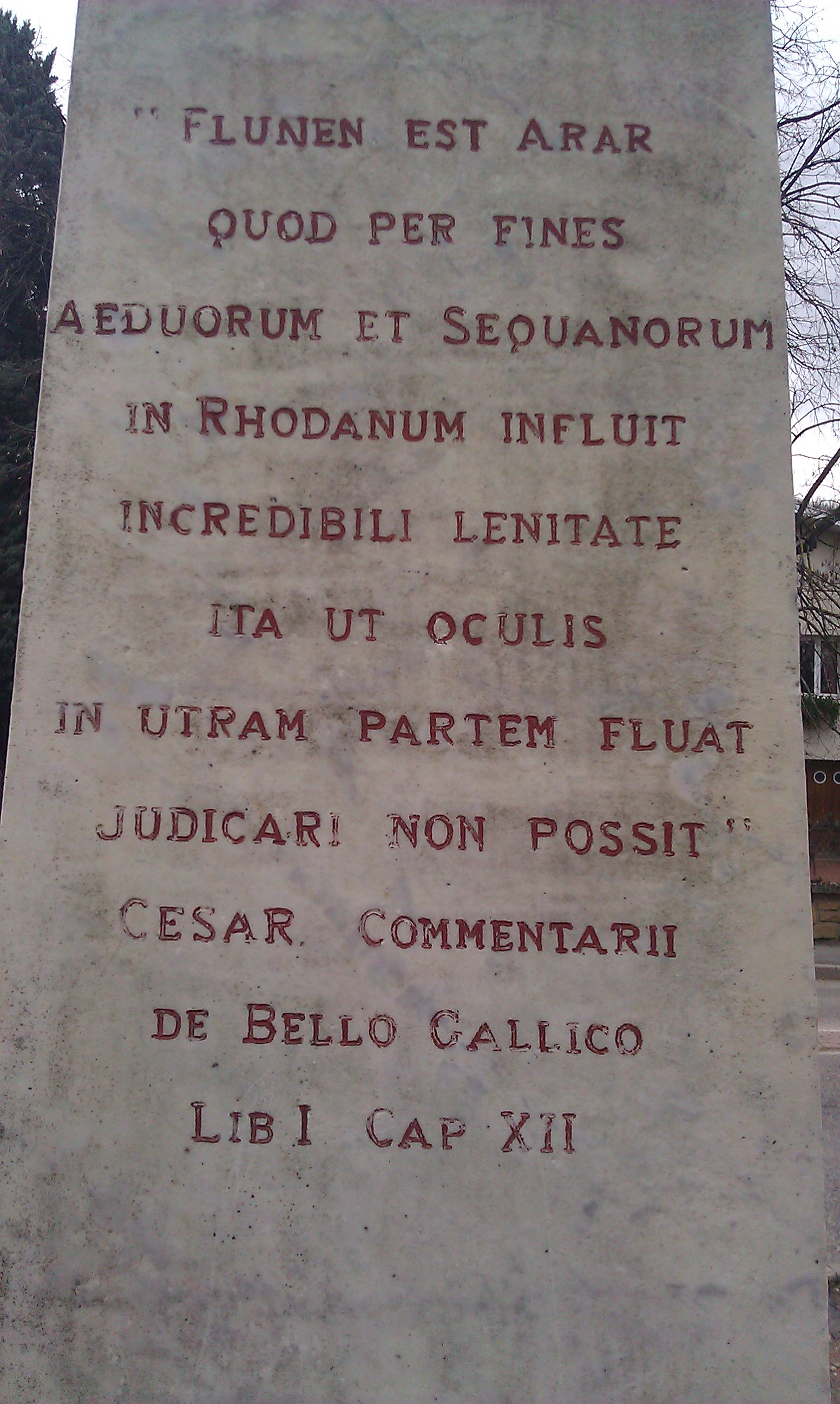 Monument aux 1er régiment de fusiliers marins, érigé à Trévoux, en mémoire de la libération de la ville, le 3 septembre 1944. Le texte se réfère à la première bataille de la Guerre des Gaules qui se tint au même endroit (texte en latin, extrait du Commentaire de la Guerre des Gaules de César).